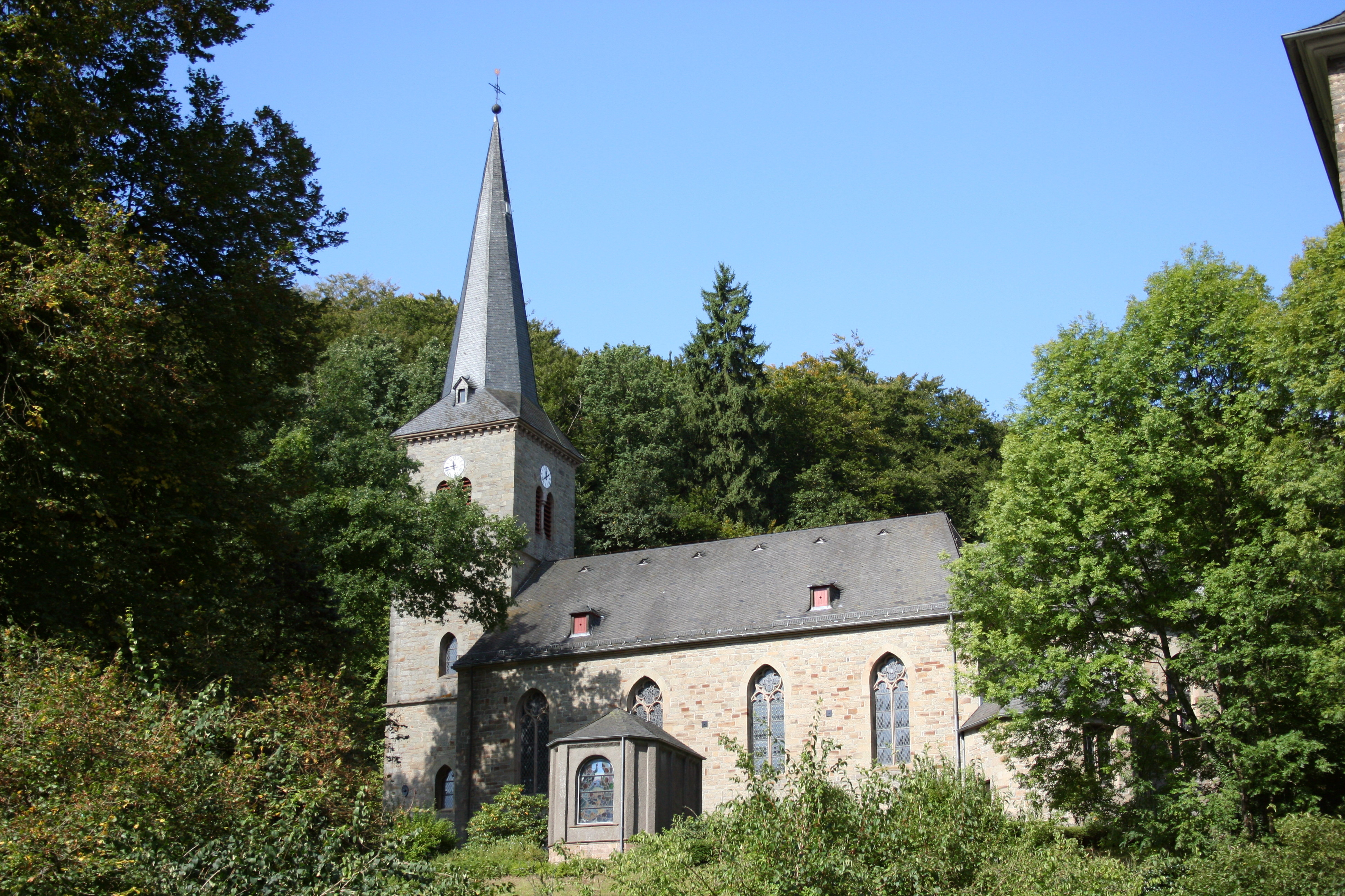 Sankt Johann Baptist in Marienheide-Gimborn